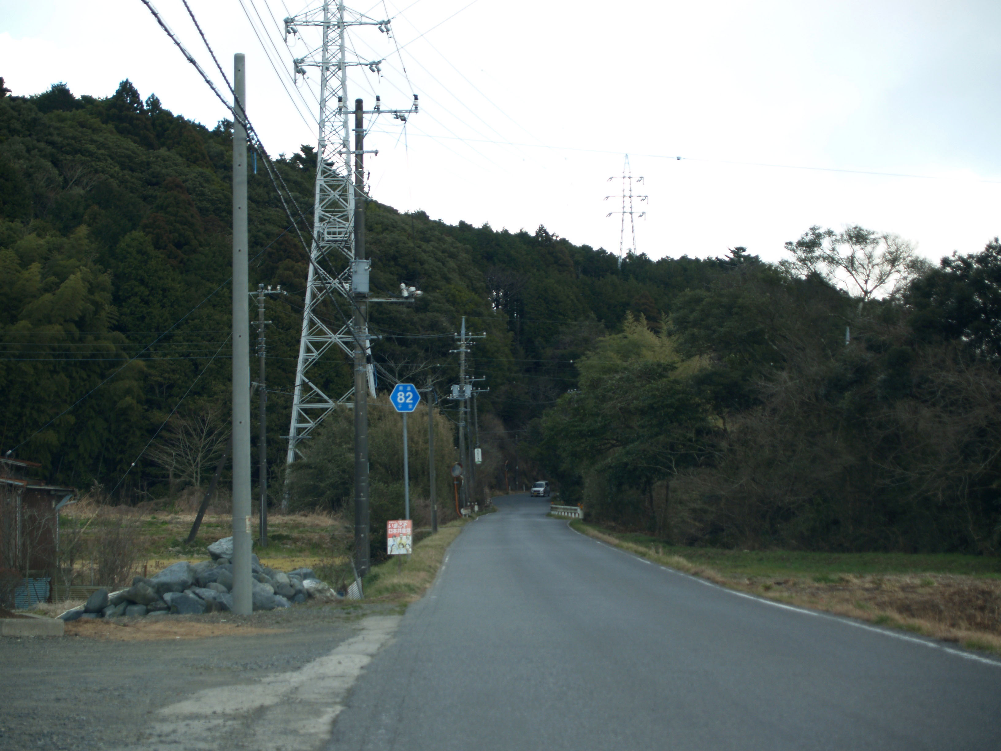 千葉県道82号天津小湊夷隅線（勝浦市内にて）